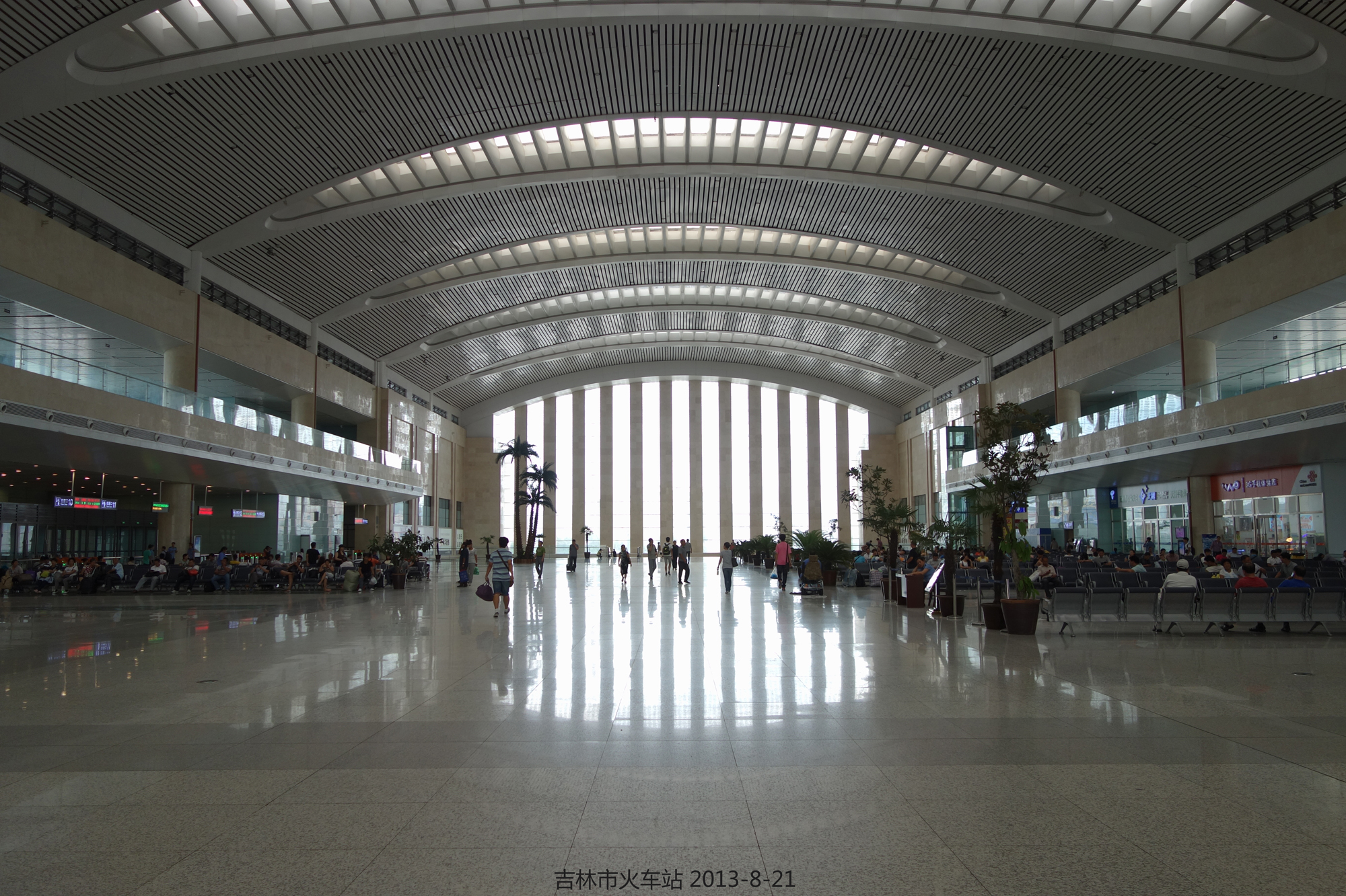 吉林站候车室